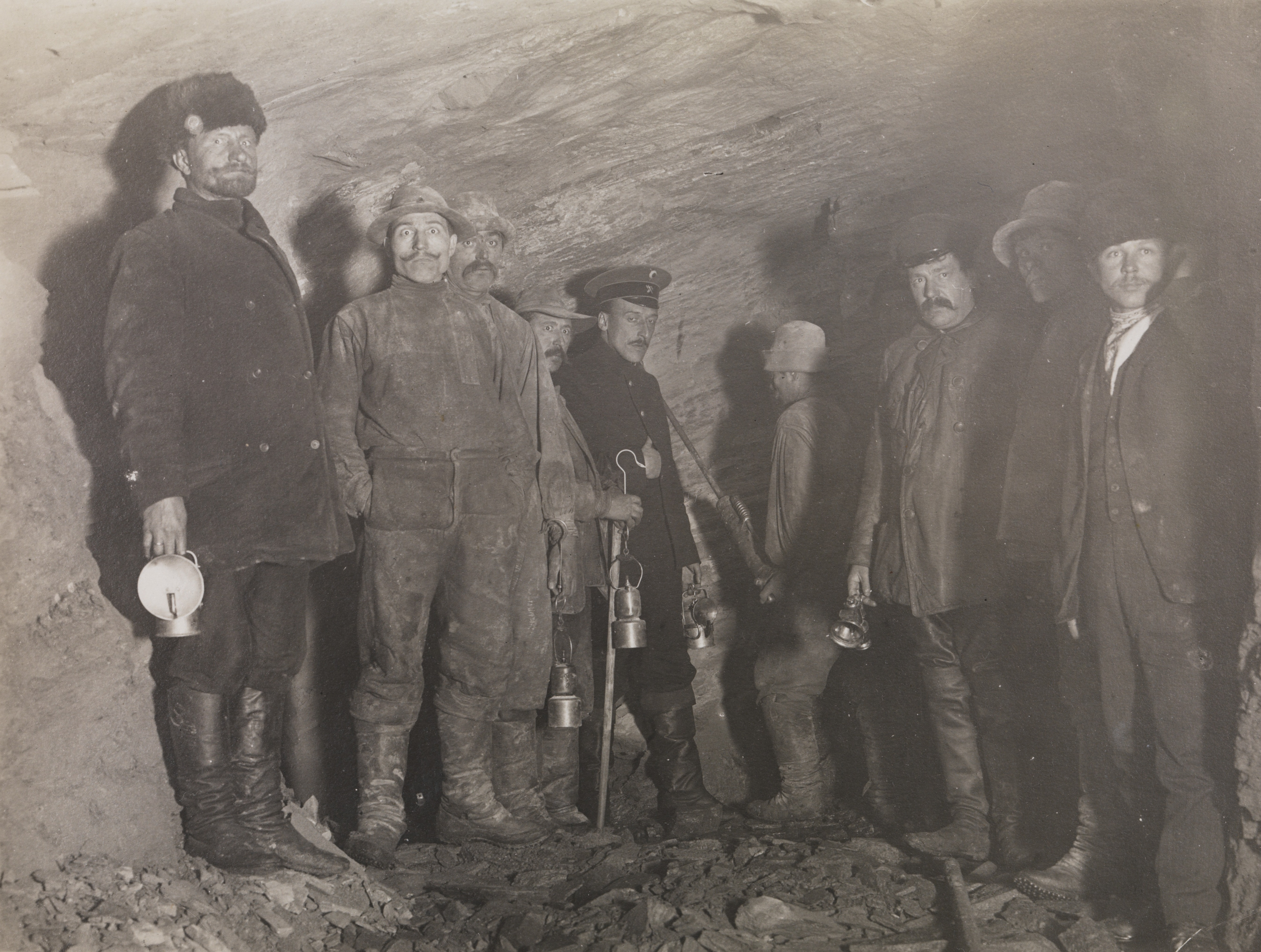 Arbeidere i den ubrudte enden av Amurbanetunnelen ved 1300 m. Depicted place: Russland, Bira